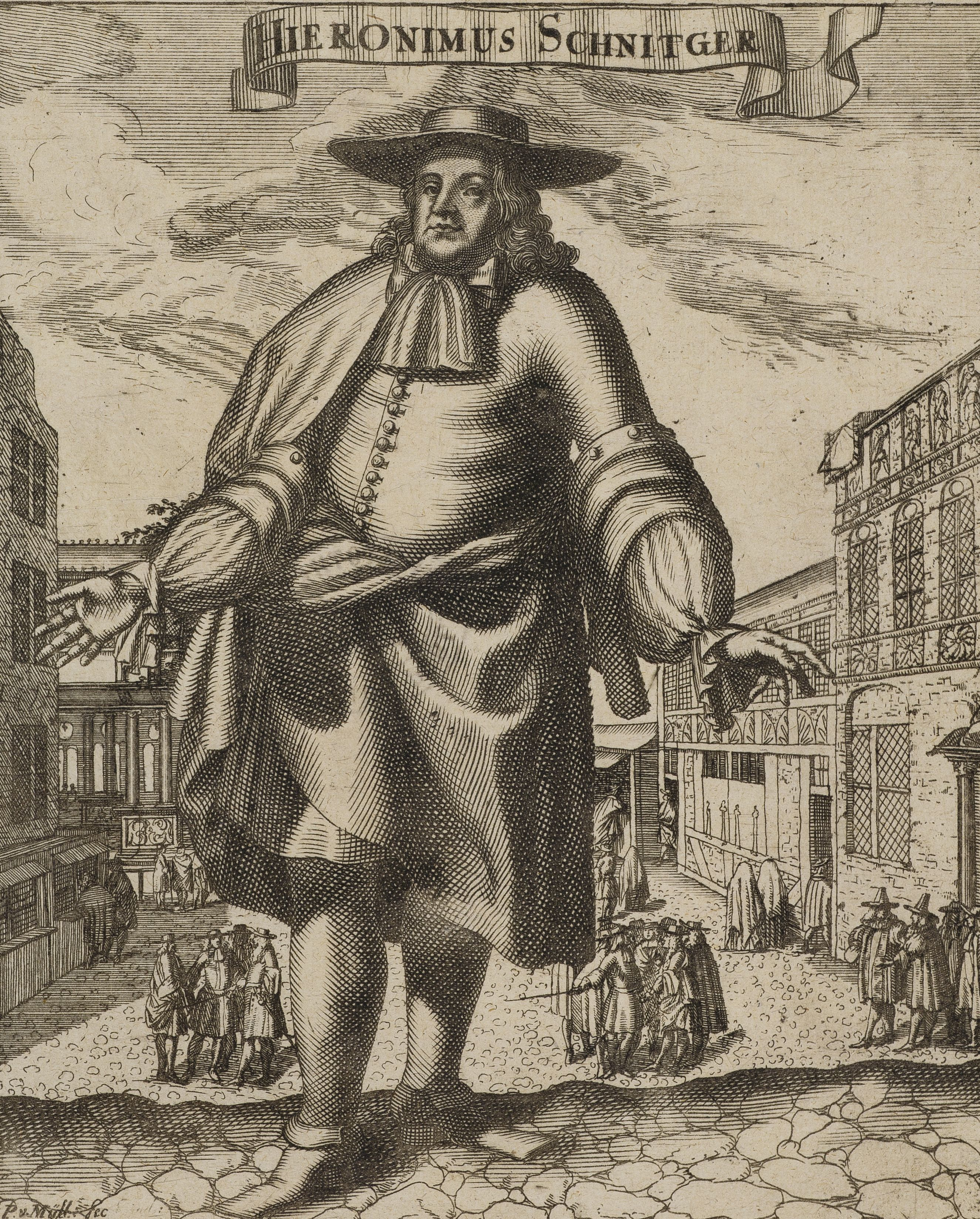 Hieronimus Schnitger